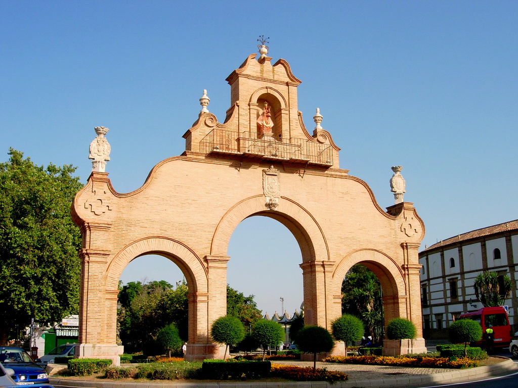 Puerta de Estepa, Antequera, España.